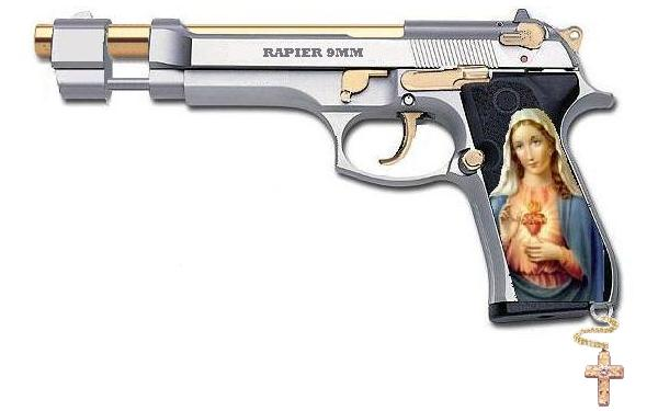 Fotomontage der Waffe von Tybalt